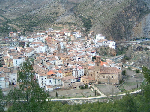 Foto panorámica de parte de Arnedillo.